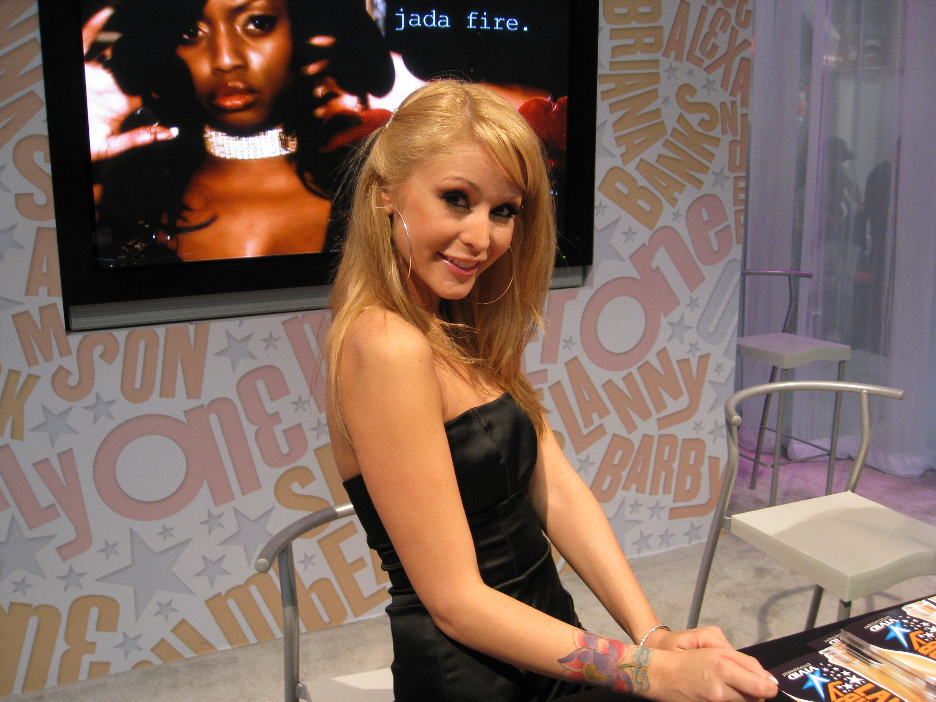 AEE2008_Day2 119